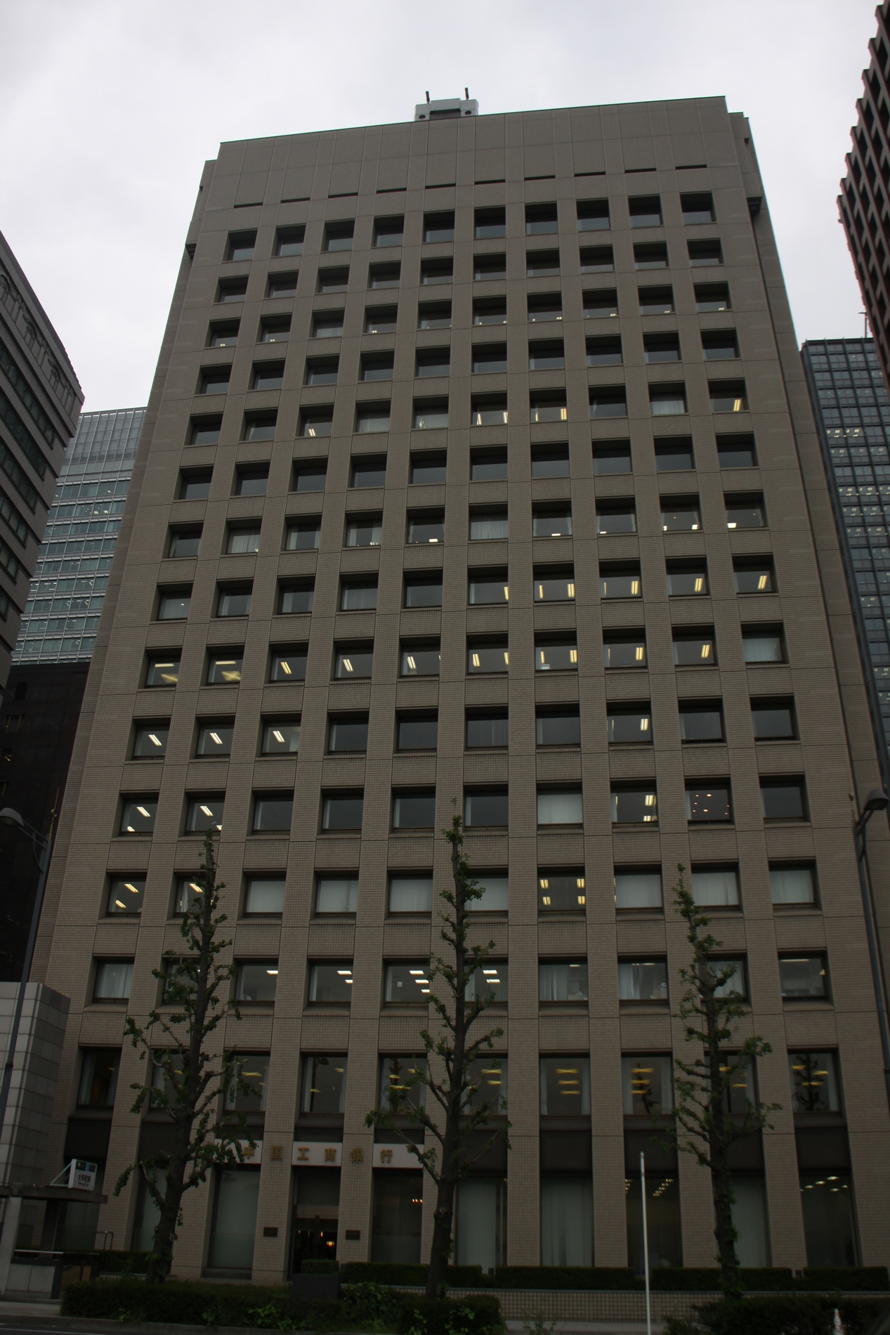 中国工商銀行東京支店